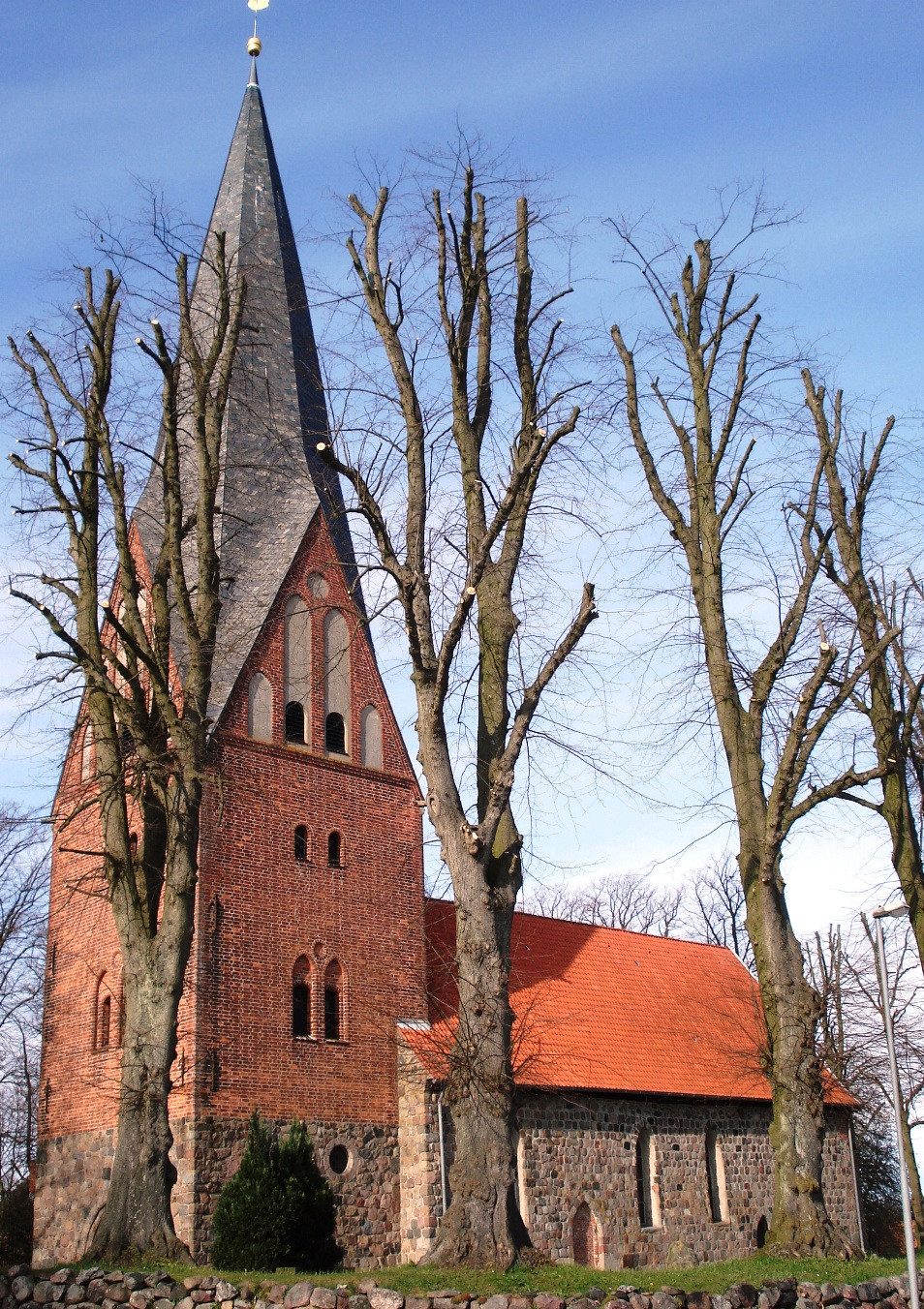 St. Clarenkirche in Blekendorf